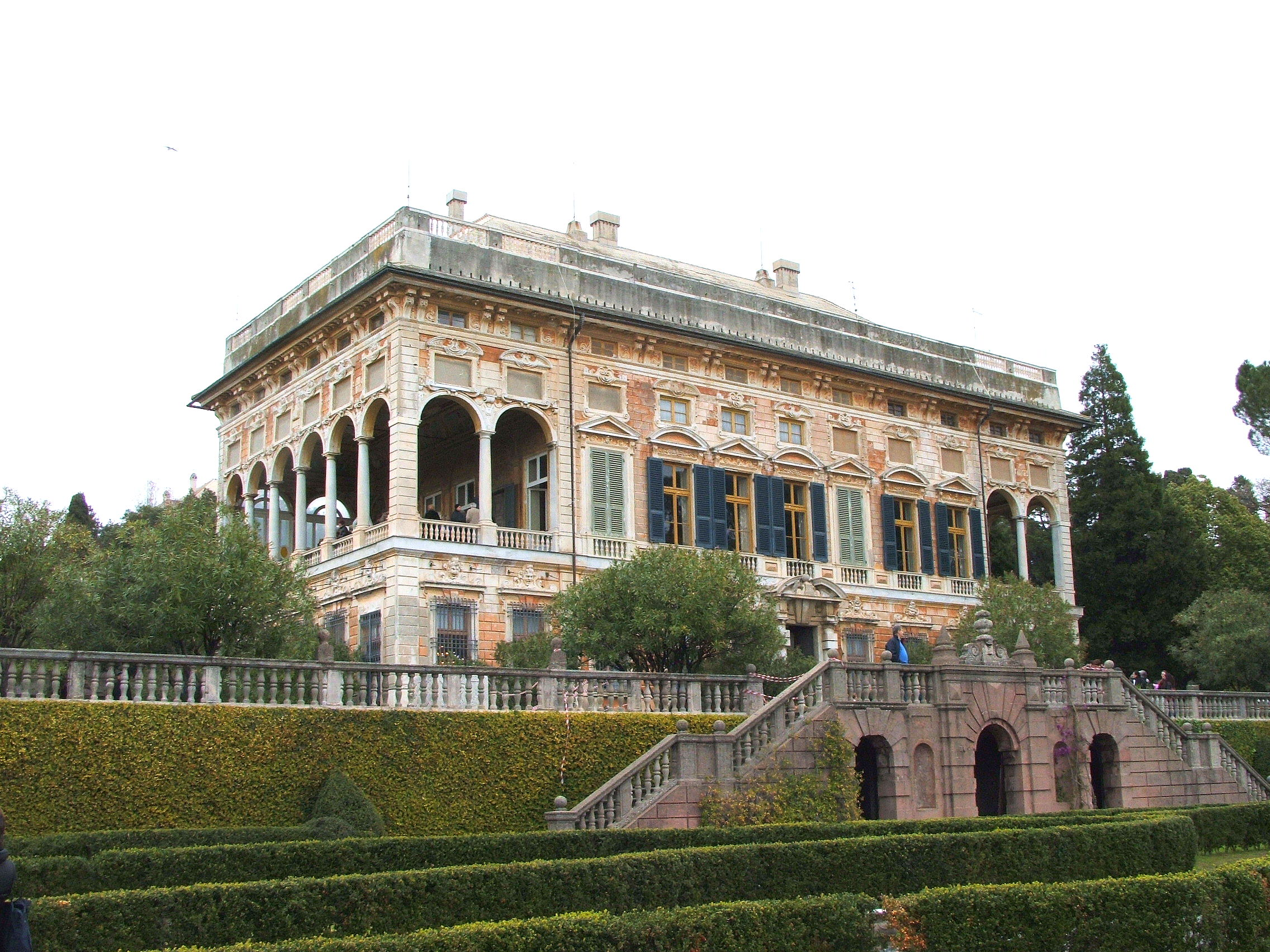 Genova, quartiere di Albaro: Villa Saluzzo Bombrini Prospetto da ponente